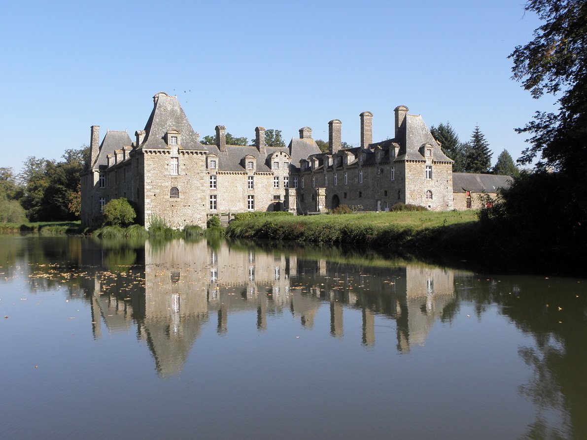 Vue méridionale de l'étang et du château du Rocher-Portail en Saint-Brice-en-Coglès (35).